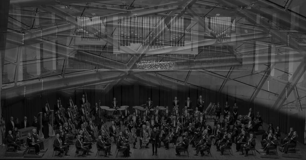 آلوم گلس در مقاله ای به مقایسه ارکسترا و مهندسی نما پرداخته است